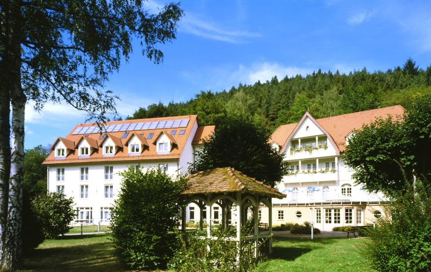 Zwei der Gästhäuser der Christliche Gästehäuser Monbachtal gemeinnützige GmbH